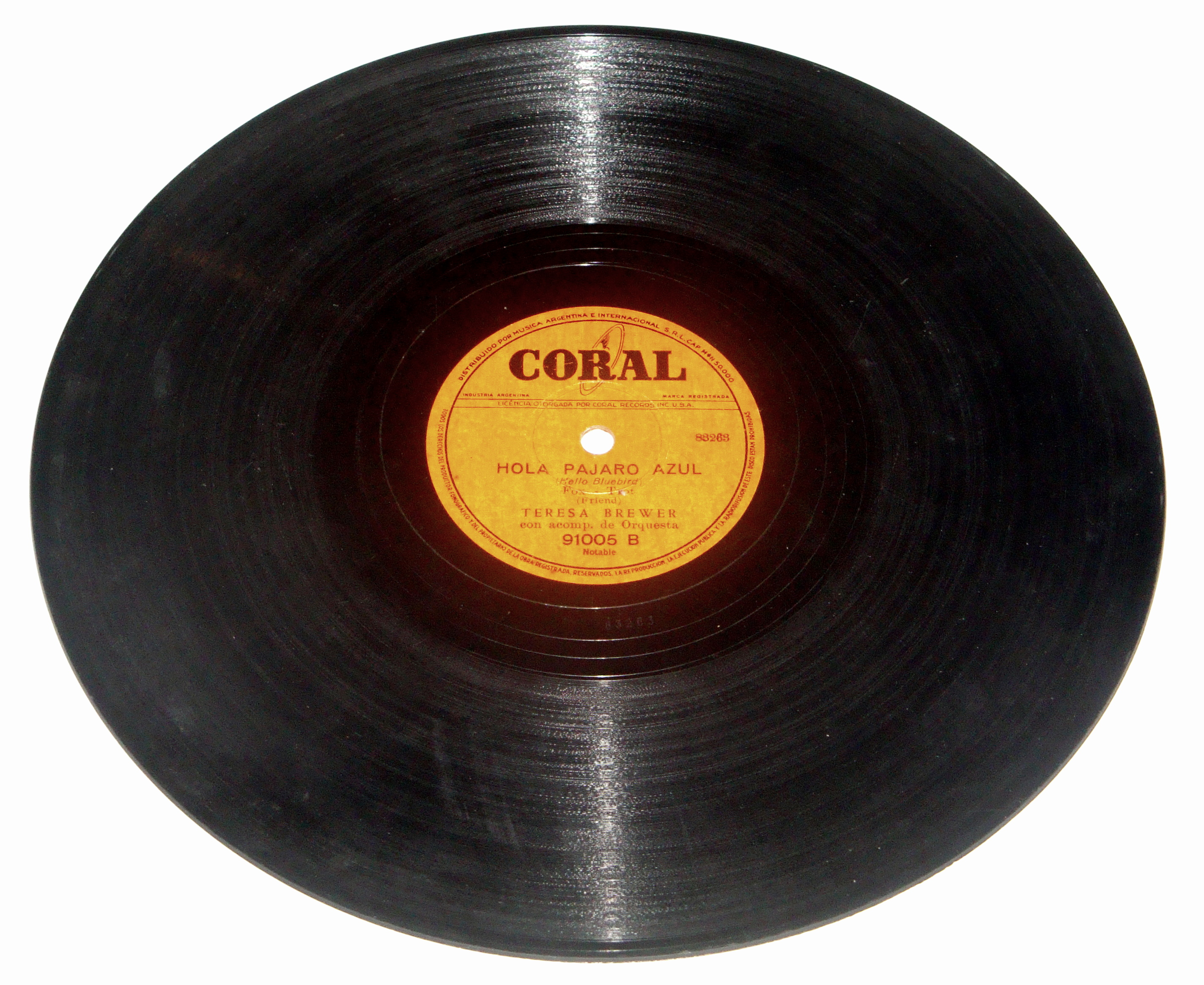 Disco de pasta de 10 pulgadas y 78 RPM